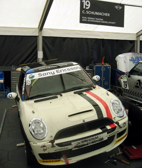 Mini von Kati König (im Hintergrund zu sehen: das Rennfahrzeug von Cora Schumacher) (Mini Challenge Race 2005)